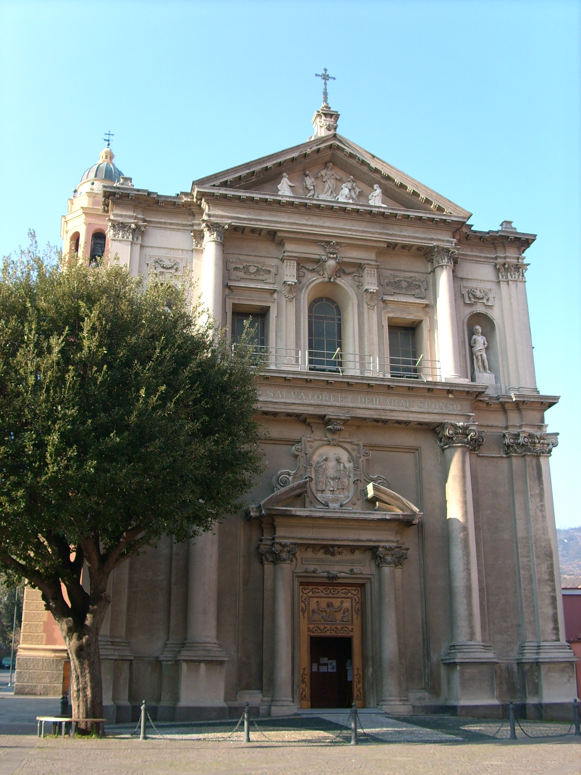 Chiesa di San Salvatore presso la frazione di Valleggia (Quiliano), Liguria, Italy